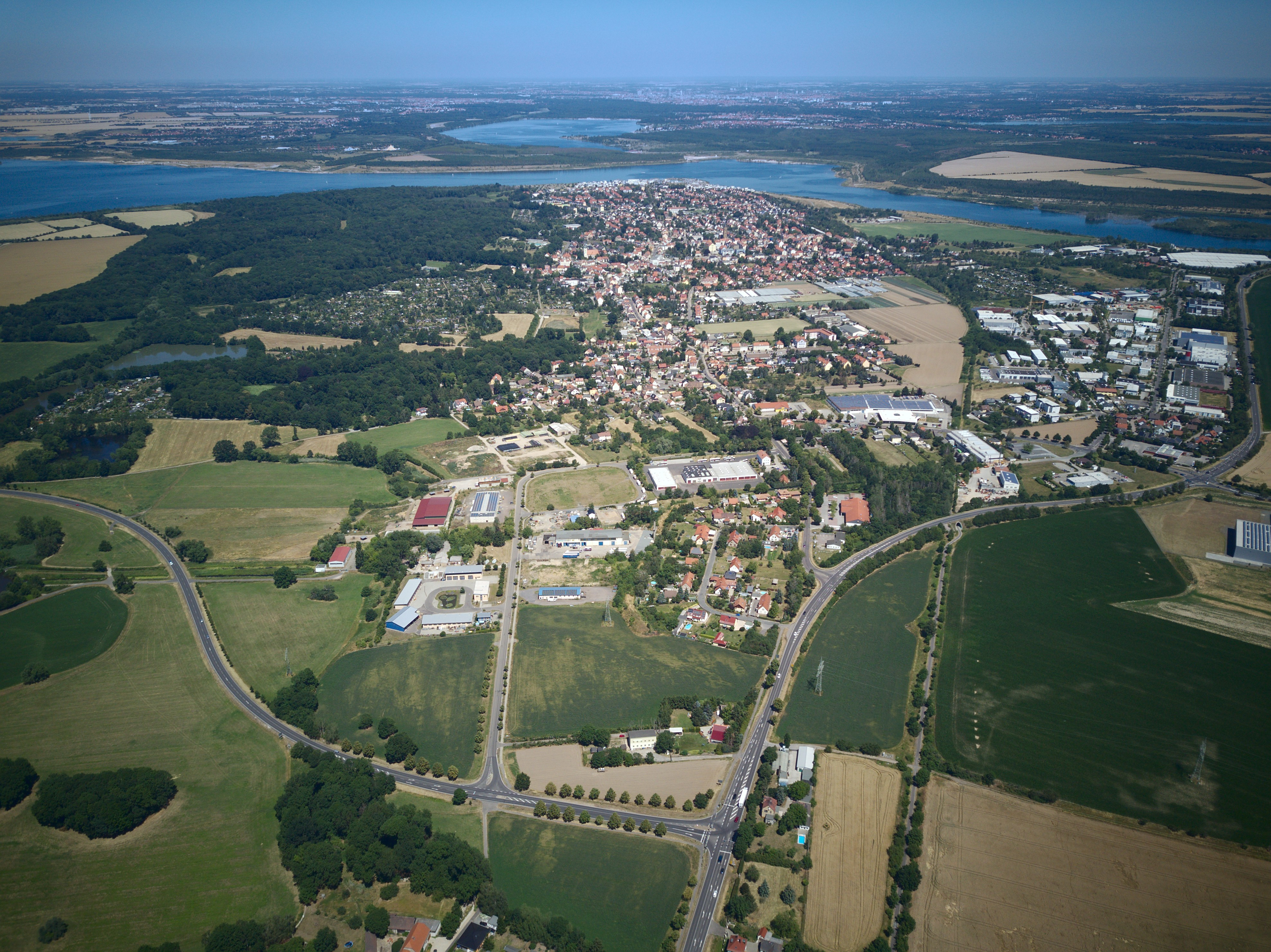 Luftbild mit Blick auf Zwenkau von Süden her. Am oberen Rand ist der Zwenkauer See zu sehen. Aufnahme Juni 2019. Das Foto versteht sich als Ergänzung zur Datei "Zwenkau 1.jpg" vom Nutzer Andreas Hannusch und zeigt eine ähnliche Perspektive mit dem nun gefluteten Zwenkauer See.